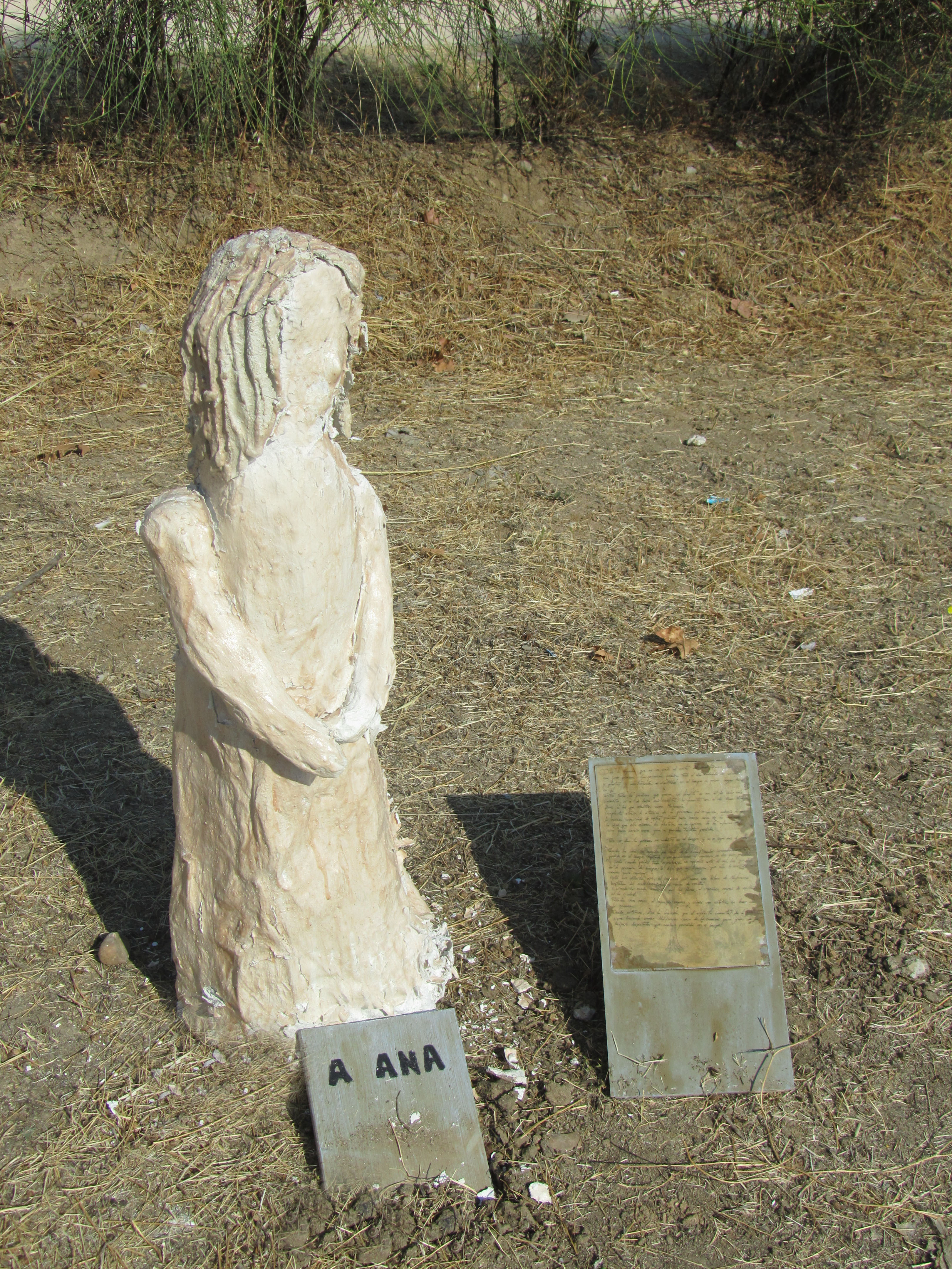 Estatua en BosqueSur